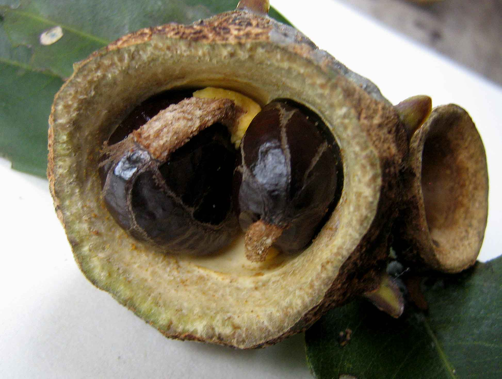 Ripe fruit.